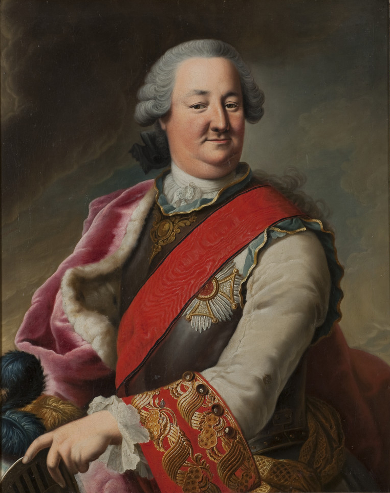 Fürst Carl von Waldeck und Pyrmont (1704-1763)